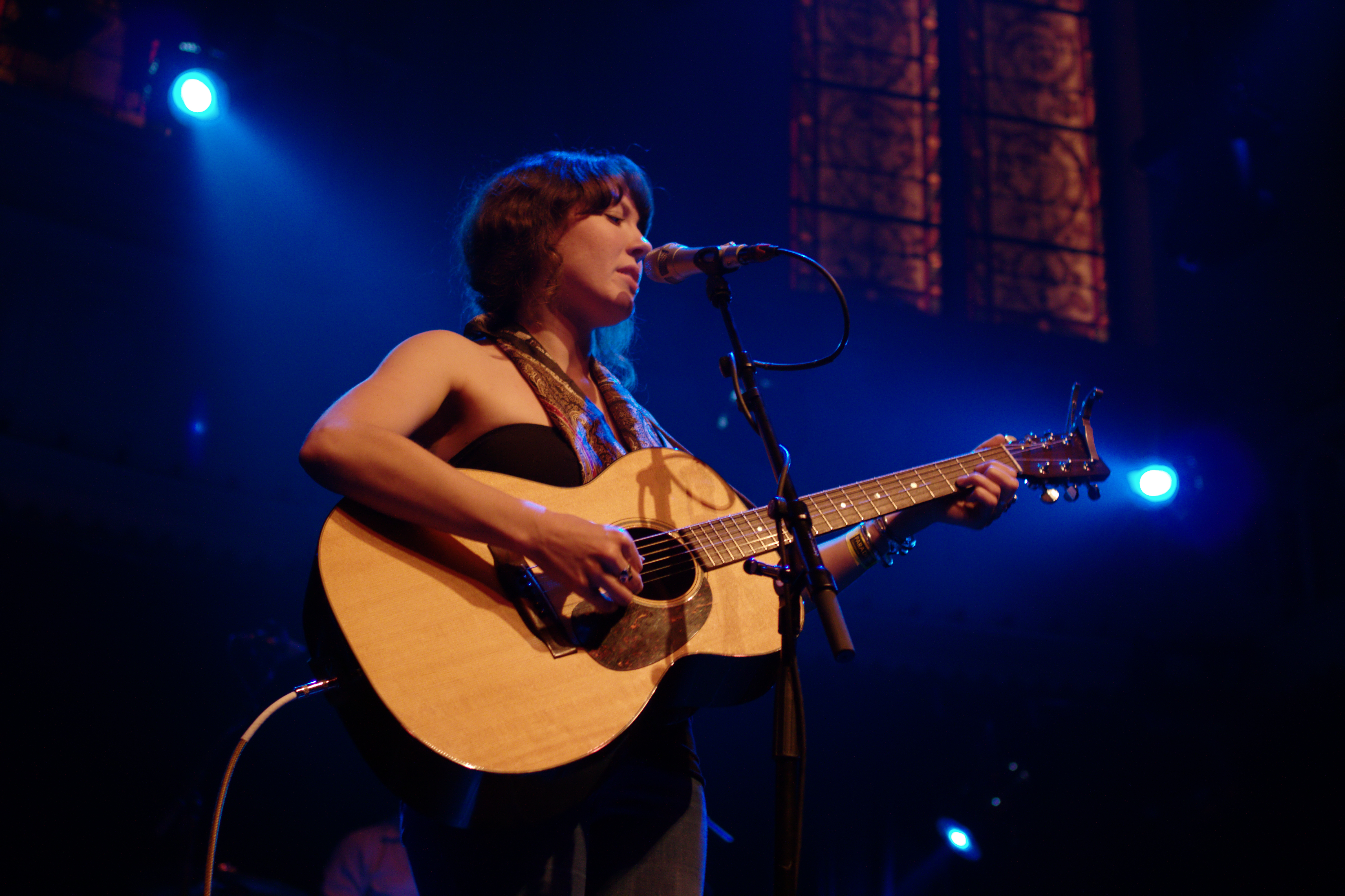 Alela Diane in Paradiso, Amsterdam, 2009-04-08